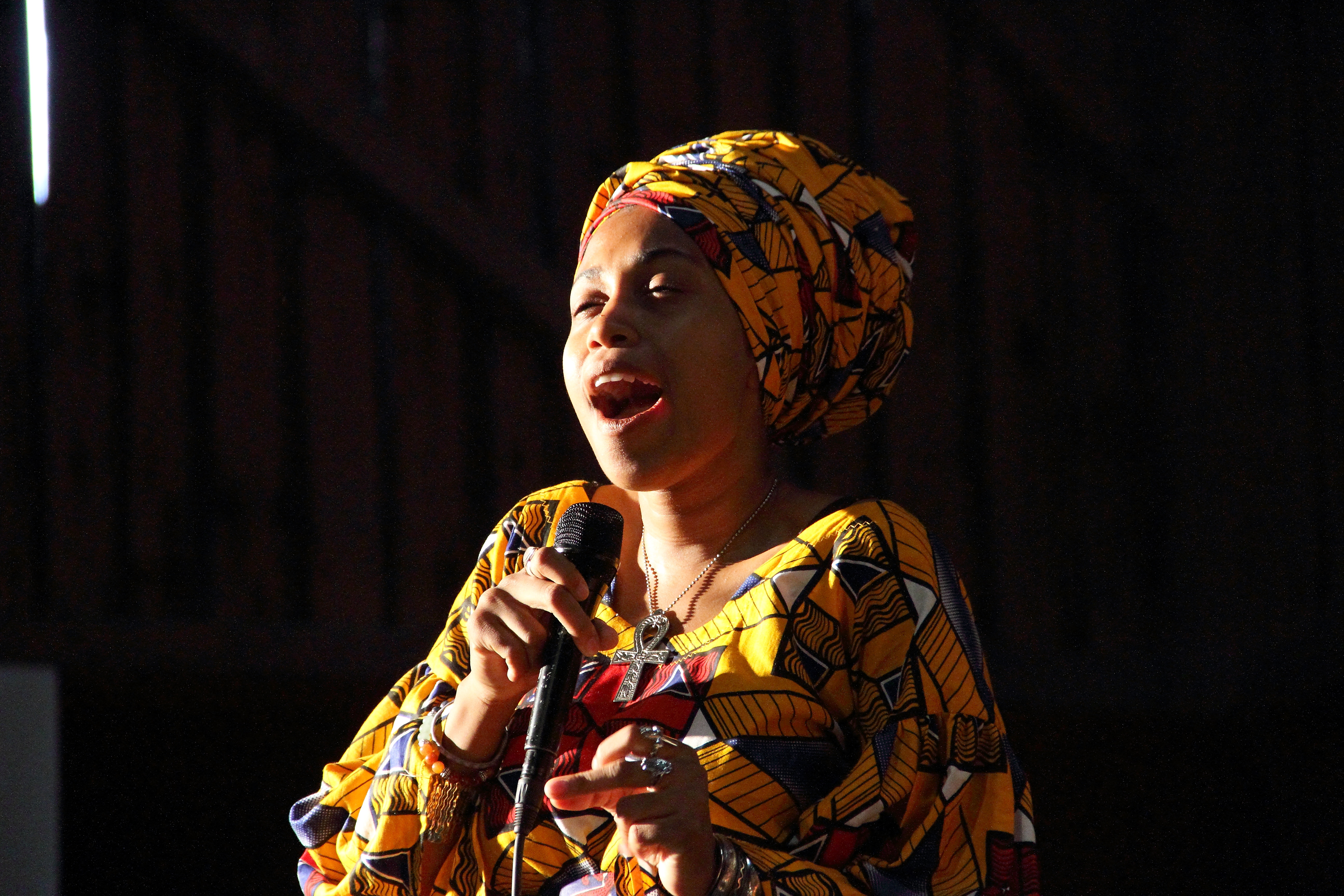 Jazzmeia Horn A Social Call auf dem INNtöne Jazzfestival 2017.